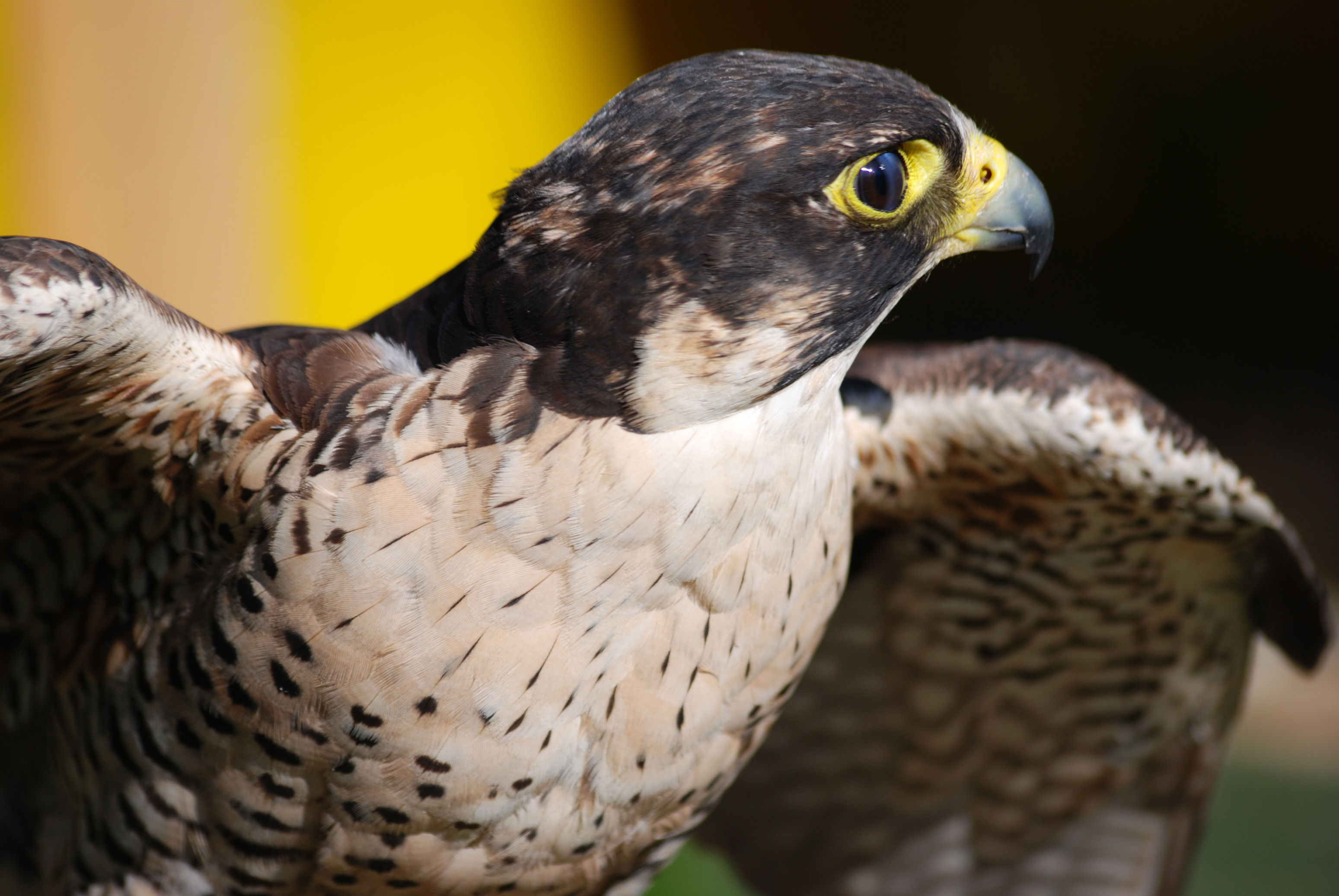 Falco perenigosos pl: Sokół wędrowny